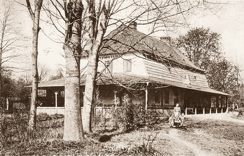 Folwark Wilhelma (Wilhelmshof), pocztówka, wydawca: R. Machaliza, przed 1904 r. (za zgodą i ze zbiorów Muzeum Historycznego w Bielsku-Białej / With permission and from the collection of Historical Museum in Bielsko-Biała)